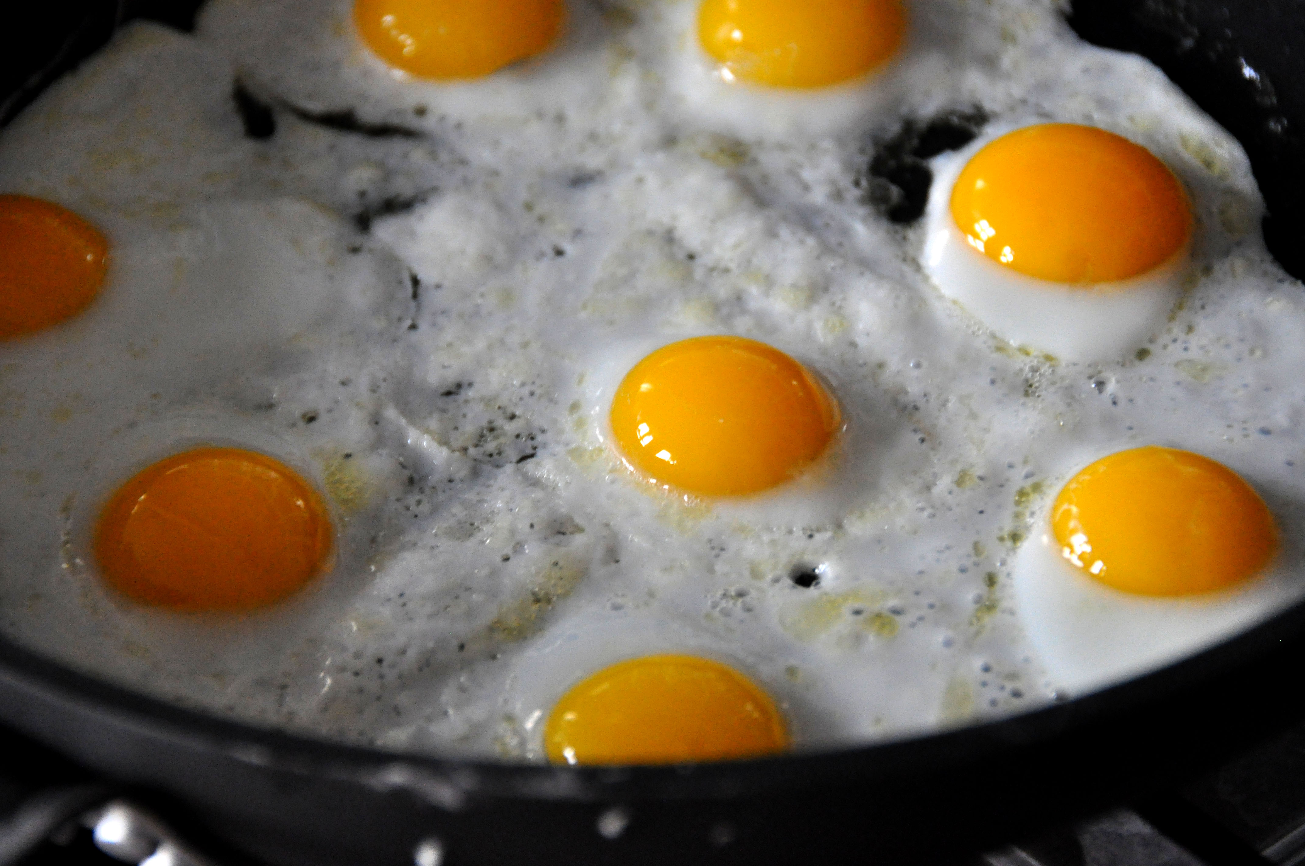 Vagtel-spejlæg